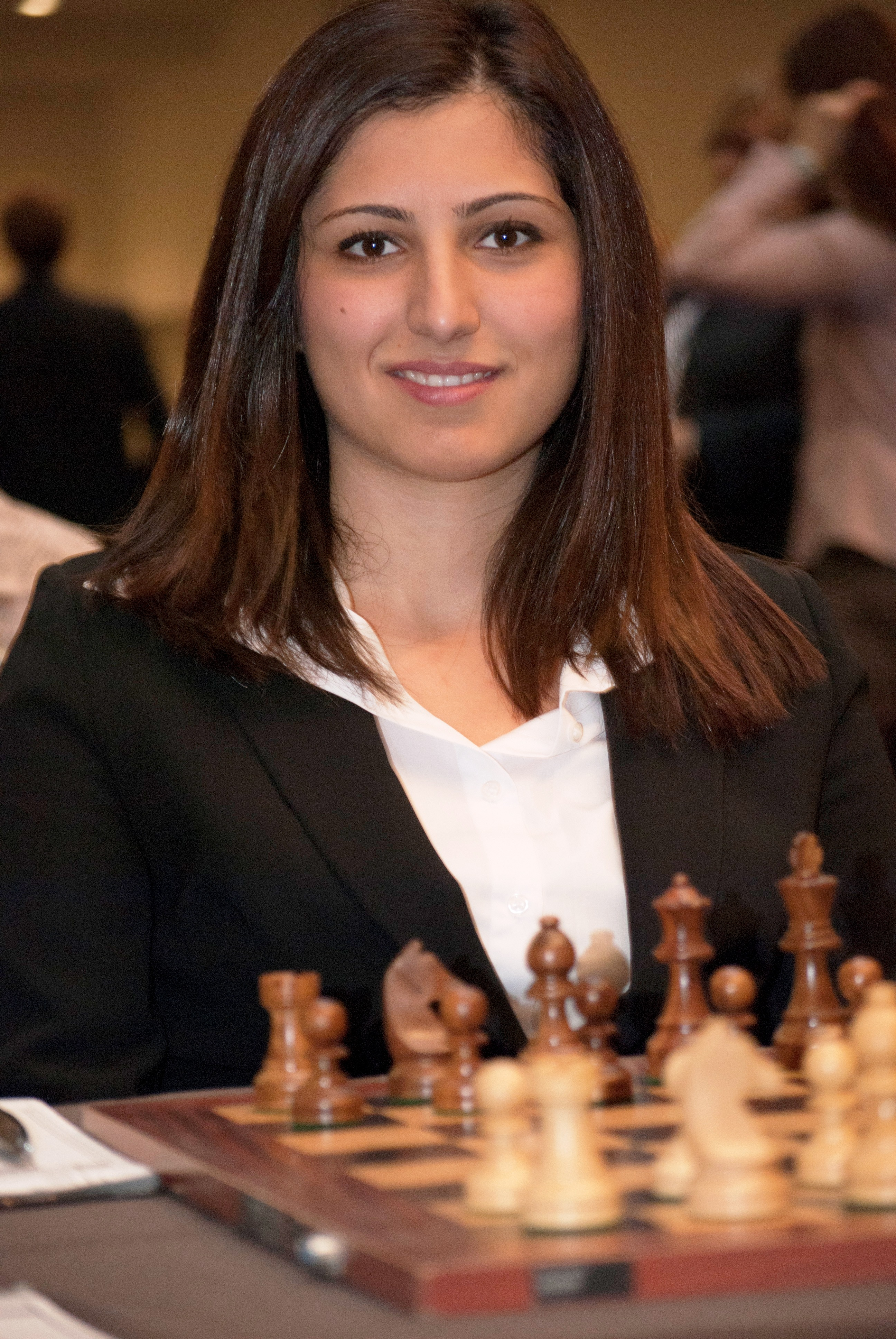 WIM Betül Cemre Yıldız, EchT Pórto Cárras 2011